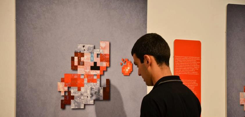 Գերաստղ Մարիո